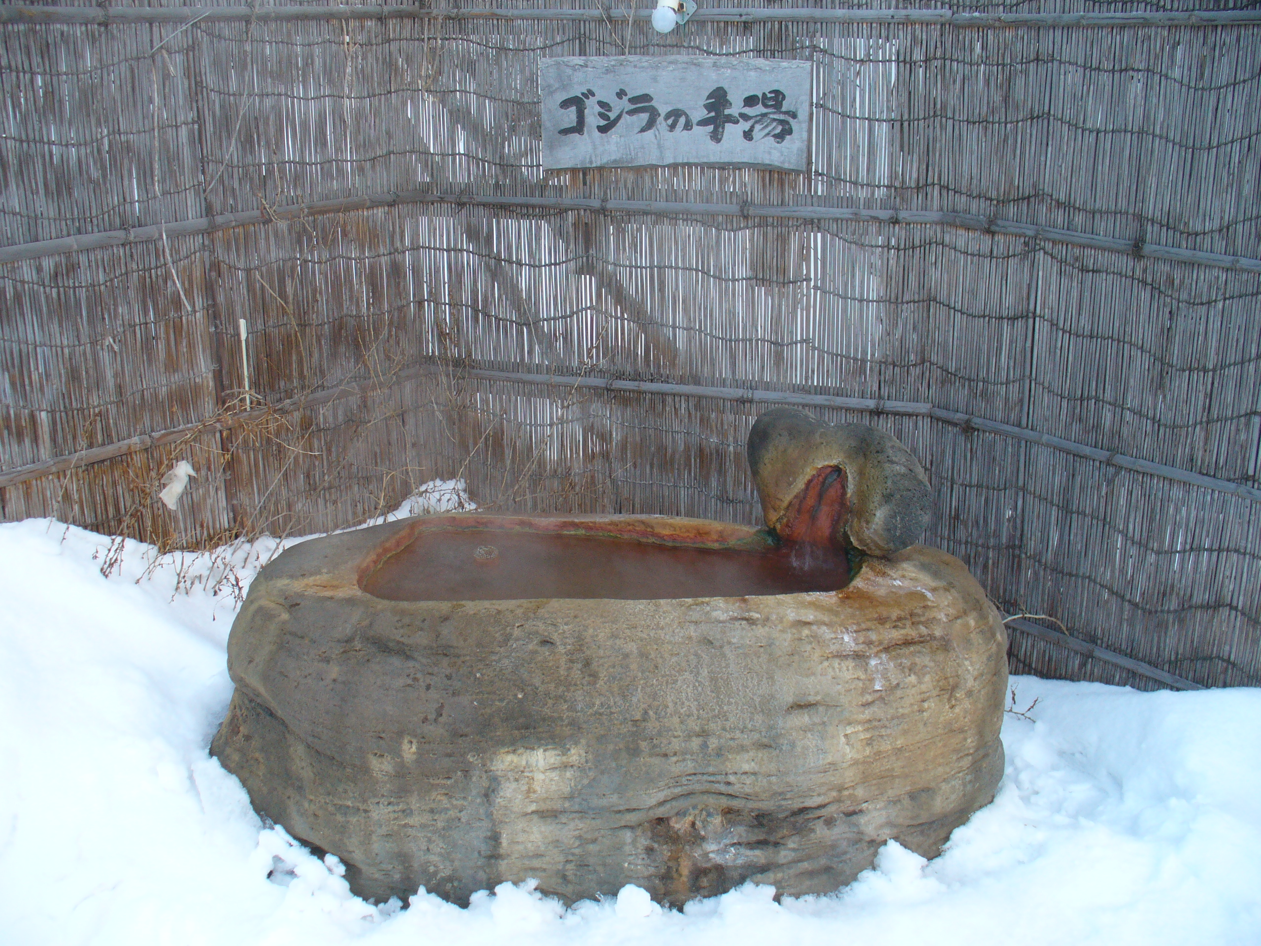 北海道ウトロ温泉にある手湯。